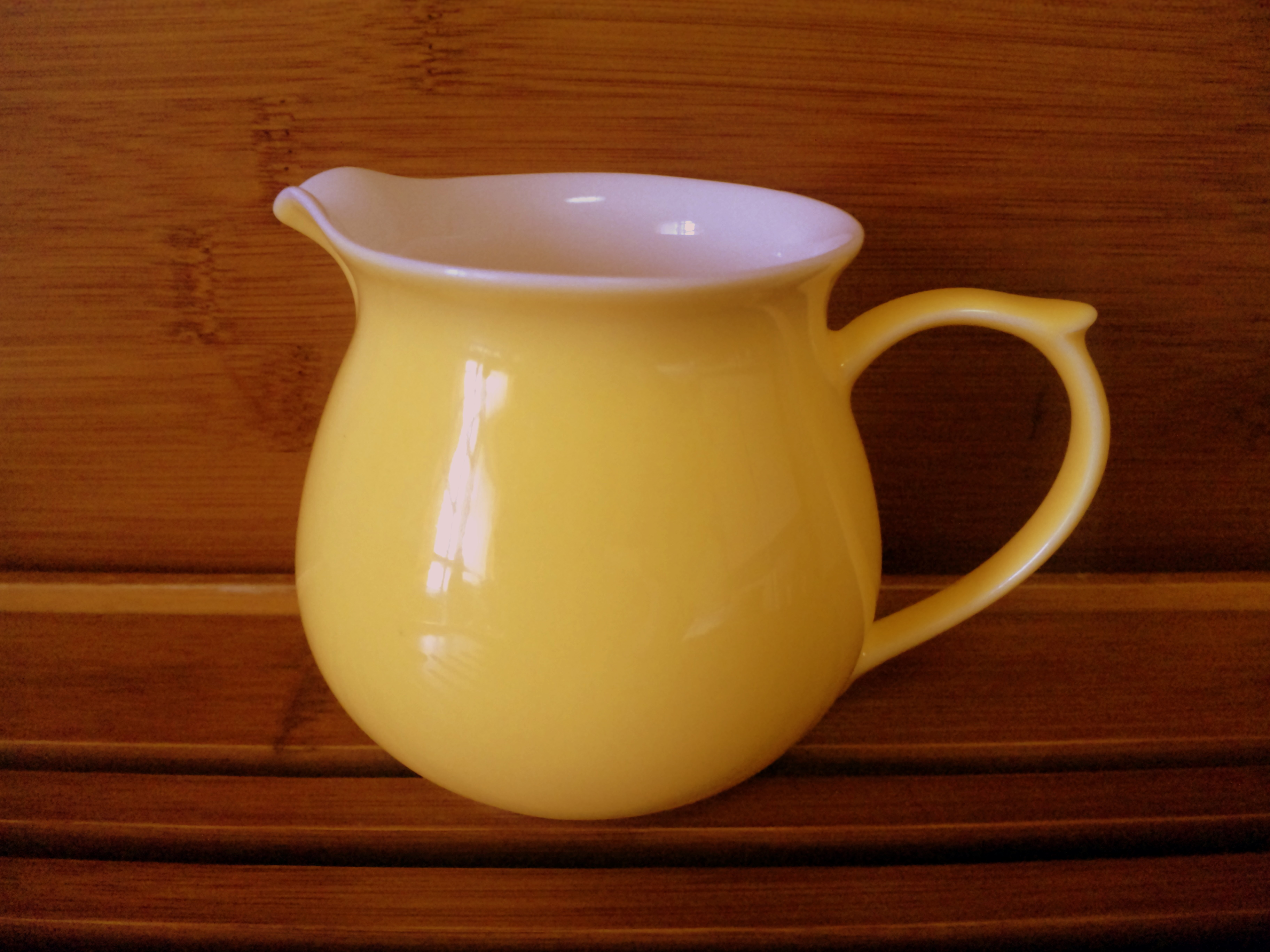 茶海。 静葉所有